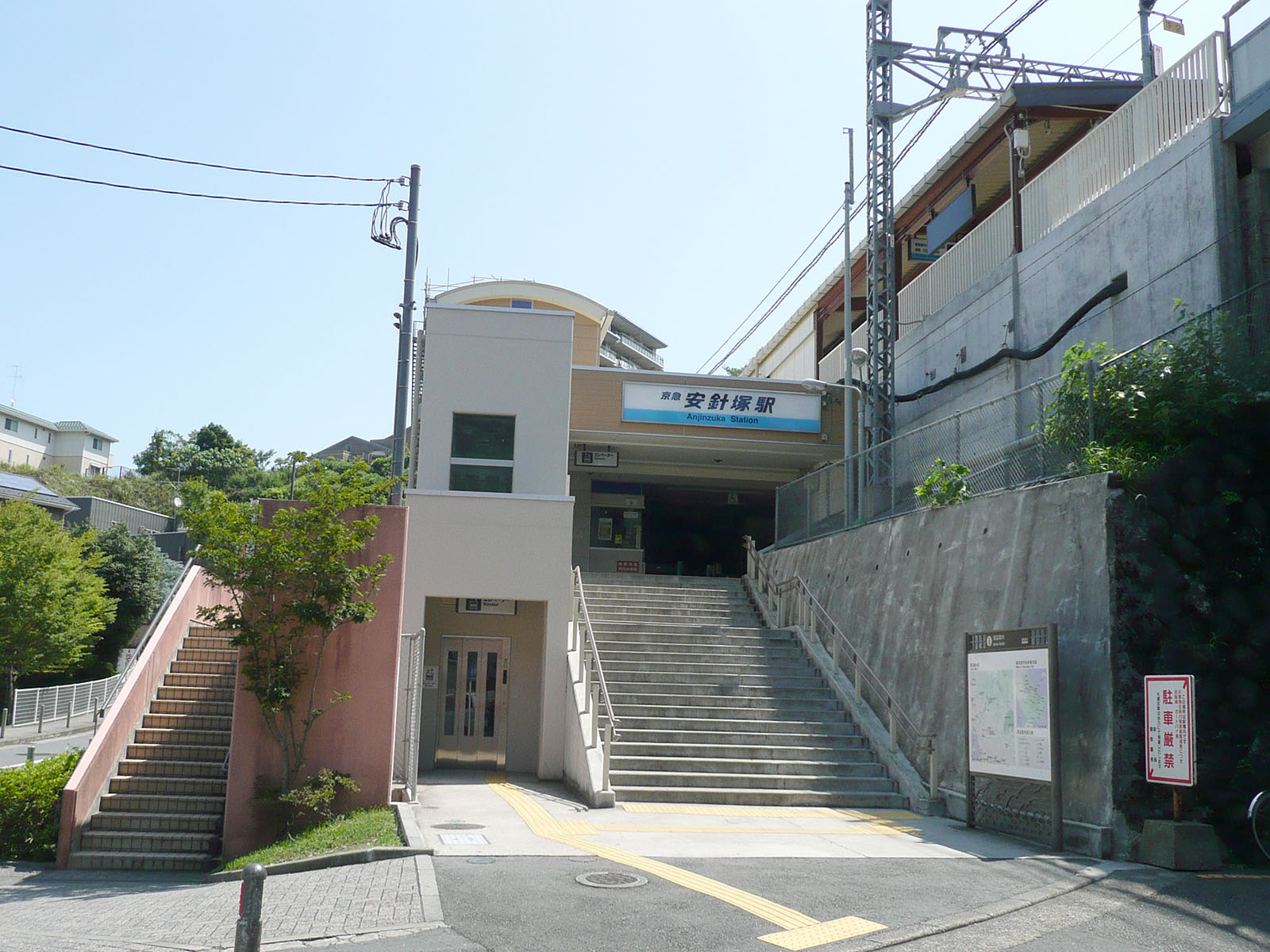 安針塚駅